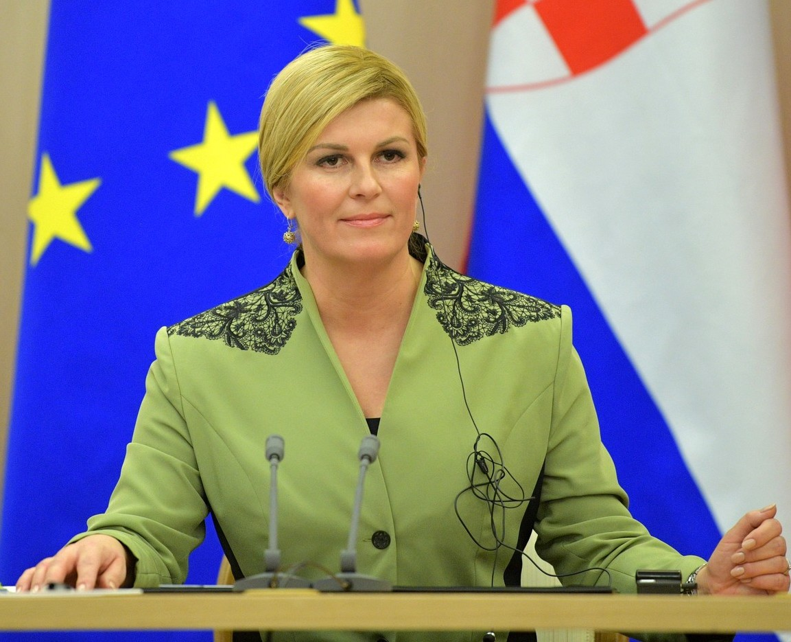 Заявления для прессы по итогам российско-хорватских переговоров. Президент Республики Хорватии Колинда Грабар-Китарович